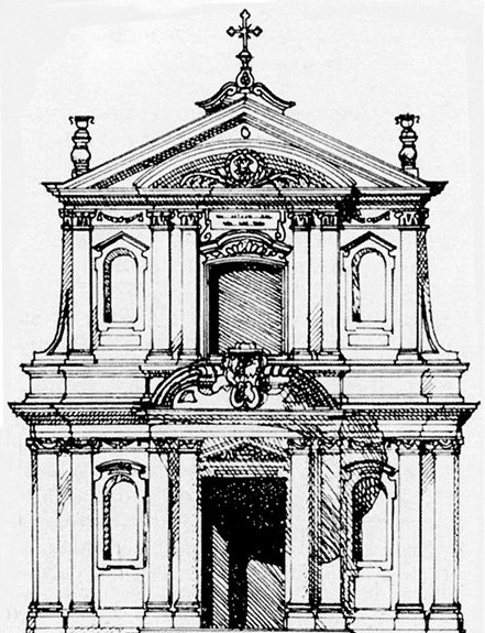 Stampa settecentesca della facciata della chiesa di San Donnino alla Mazza